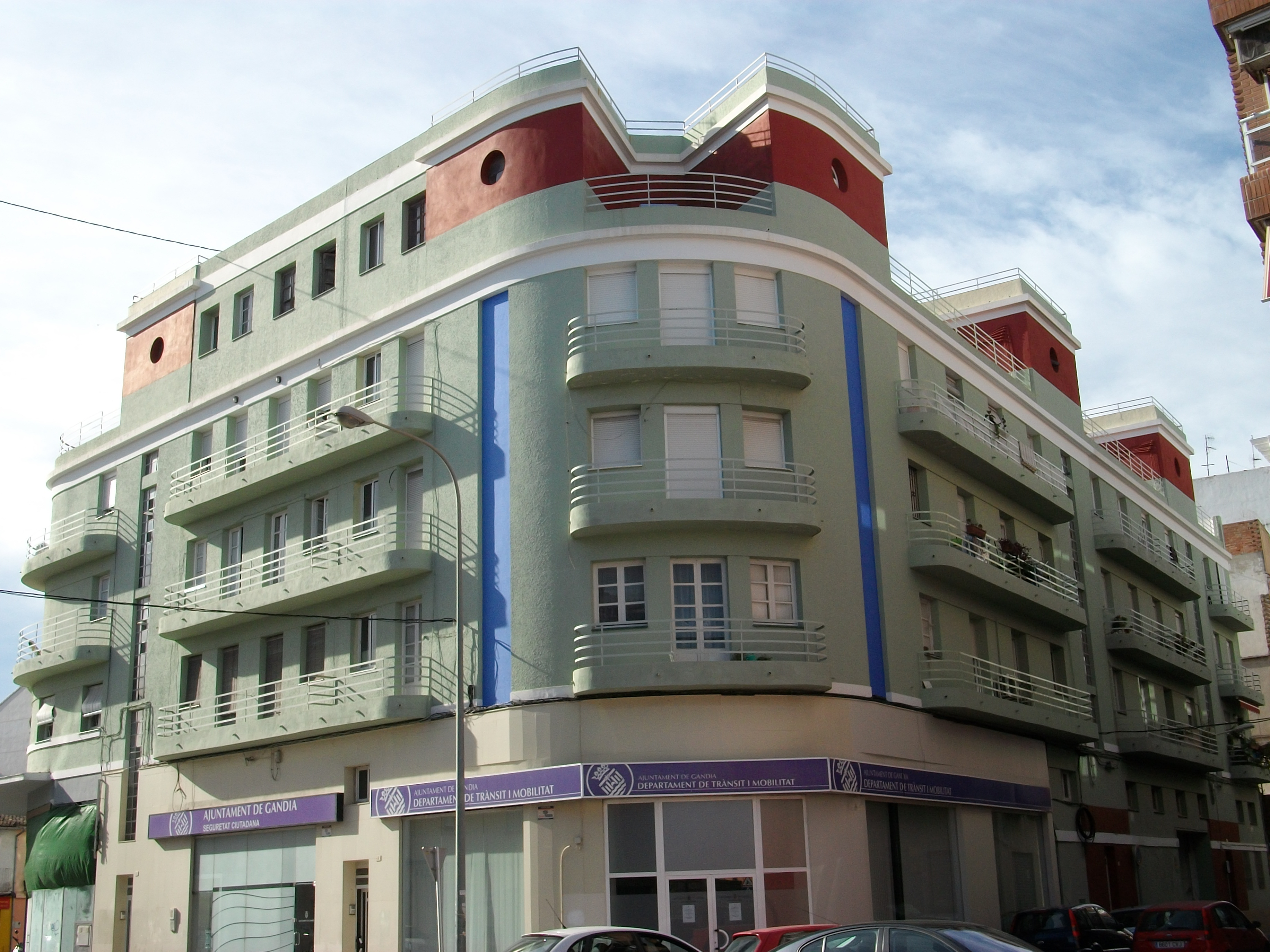 Part posterior de l'edifici TASA de Gandia.